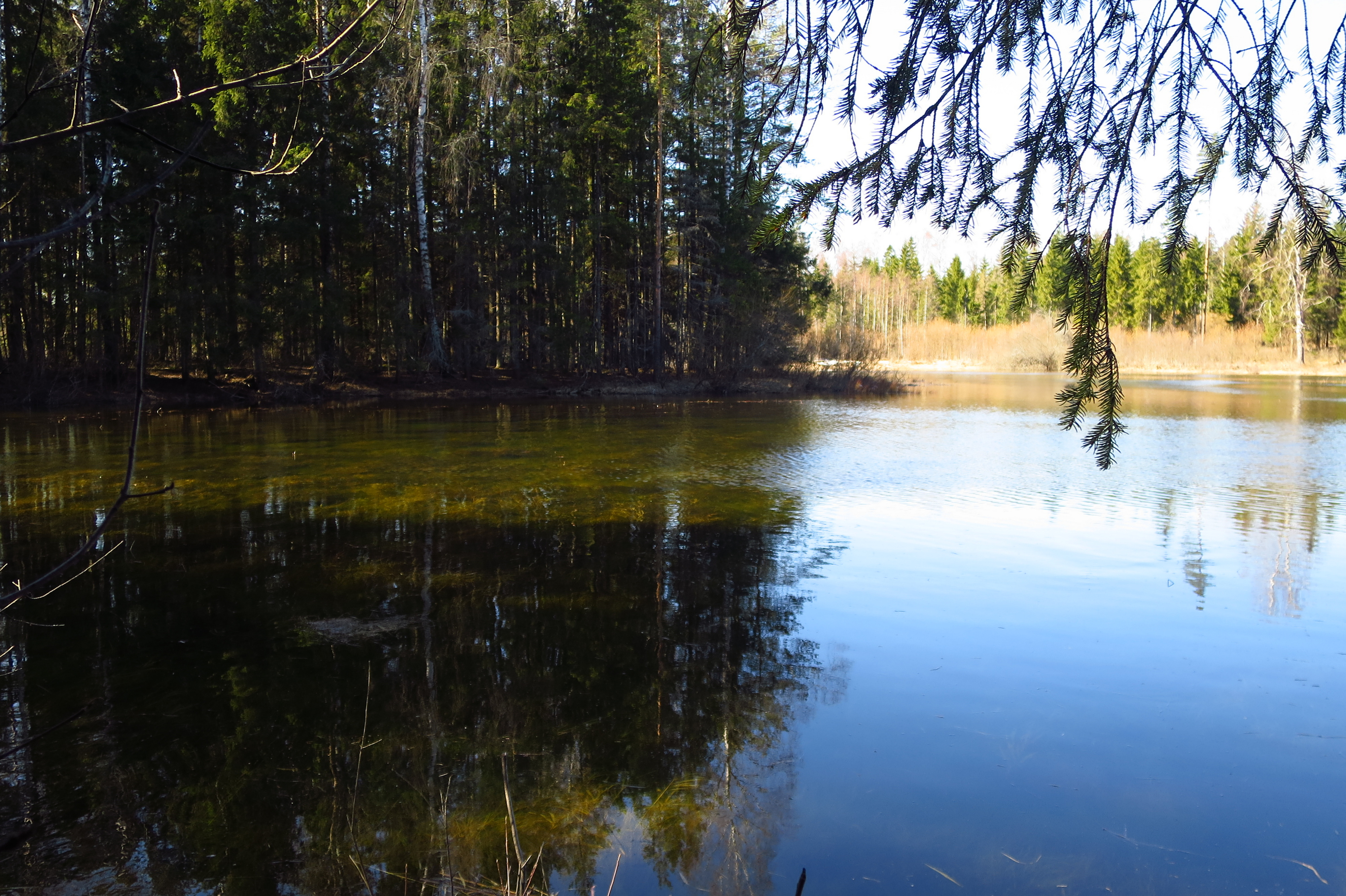 Piisupi järv Võhmetu-Lemküla järvestikus Porkuni maastikukaitsealal